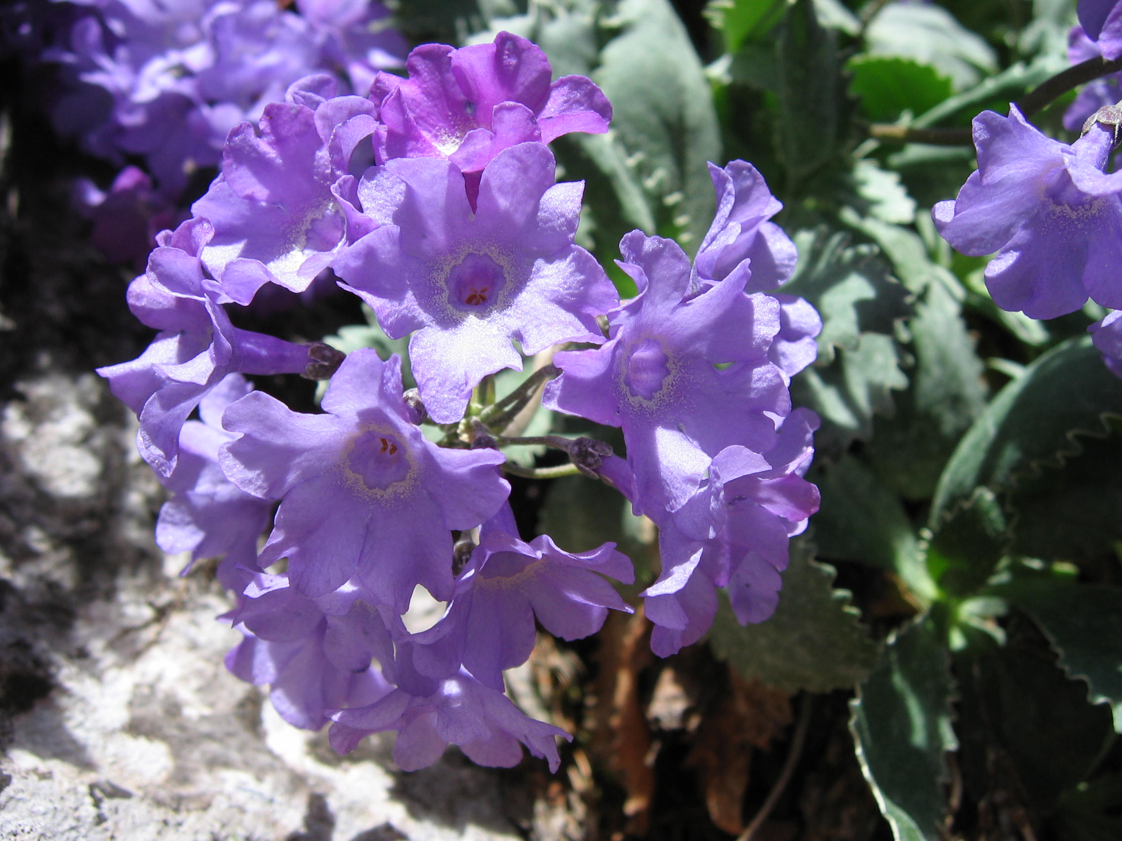 Primevère marginée (Primula marginata) : Saint Paul en Ubaye - France (05)